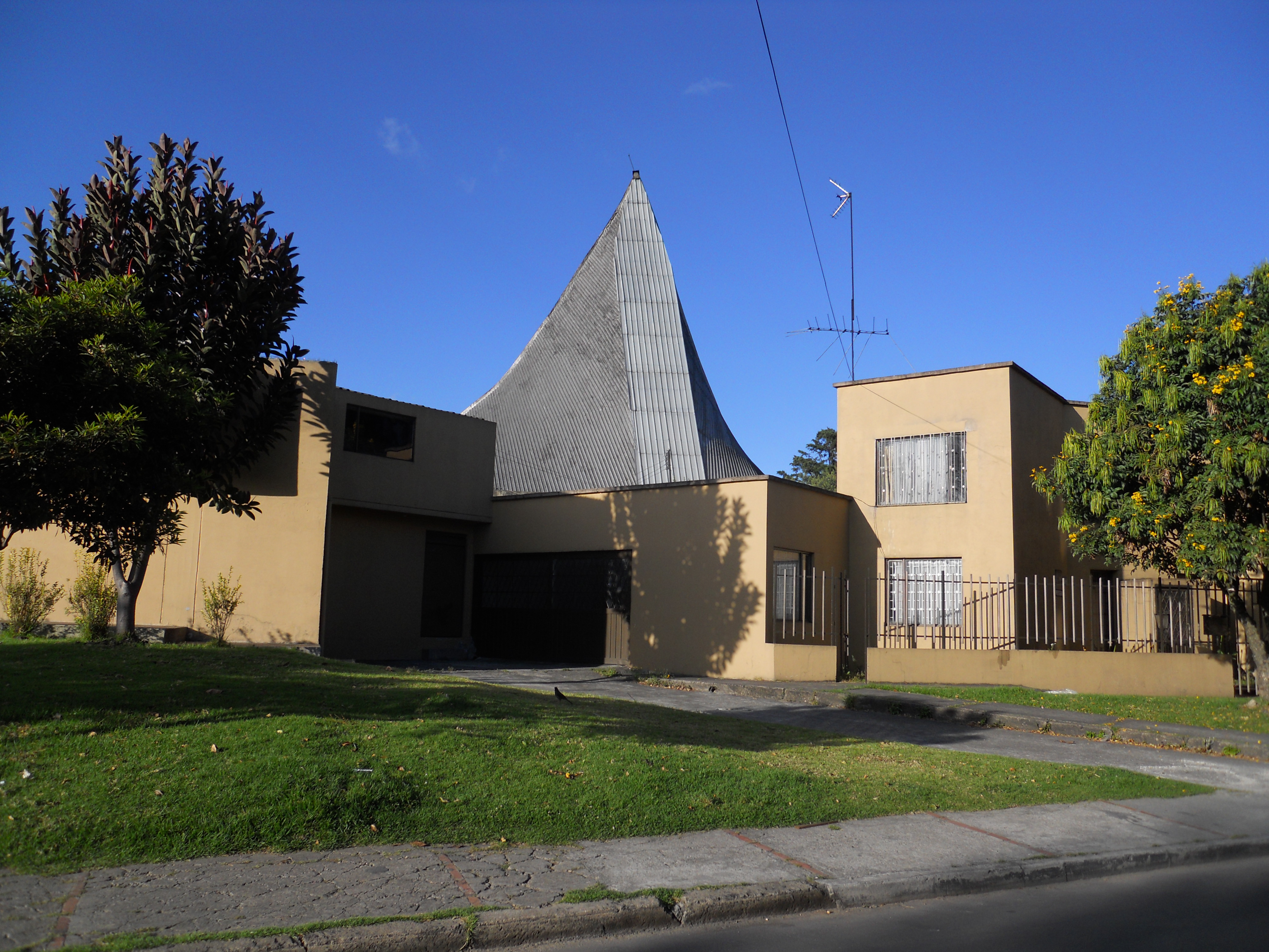 Parroquia San Francisca Romana, carrera 27 con calle 70 Bogotá. Barrio Alcázares Norte.